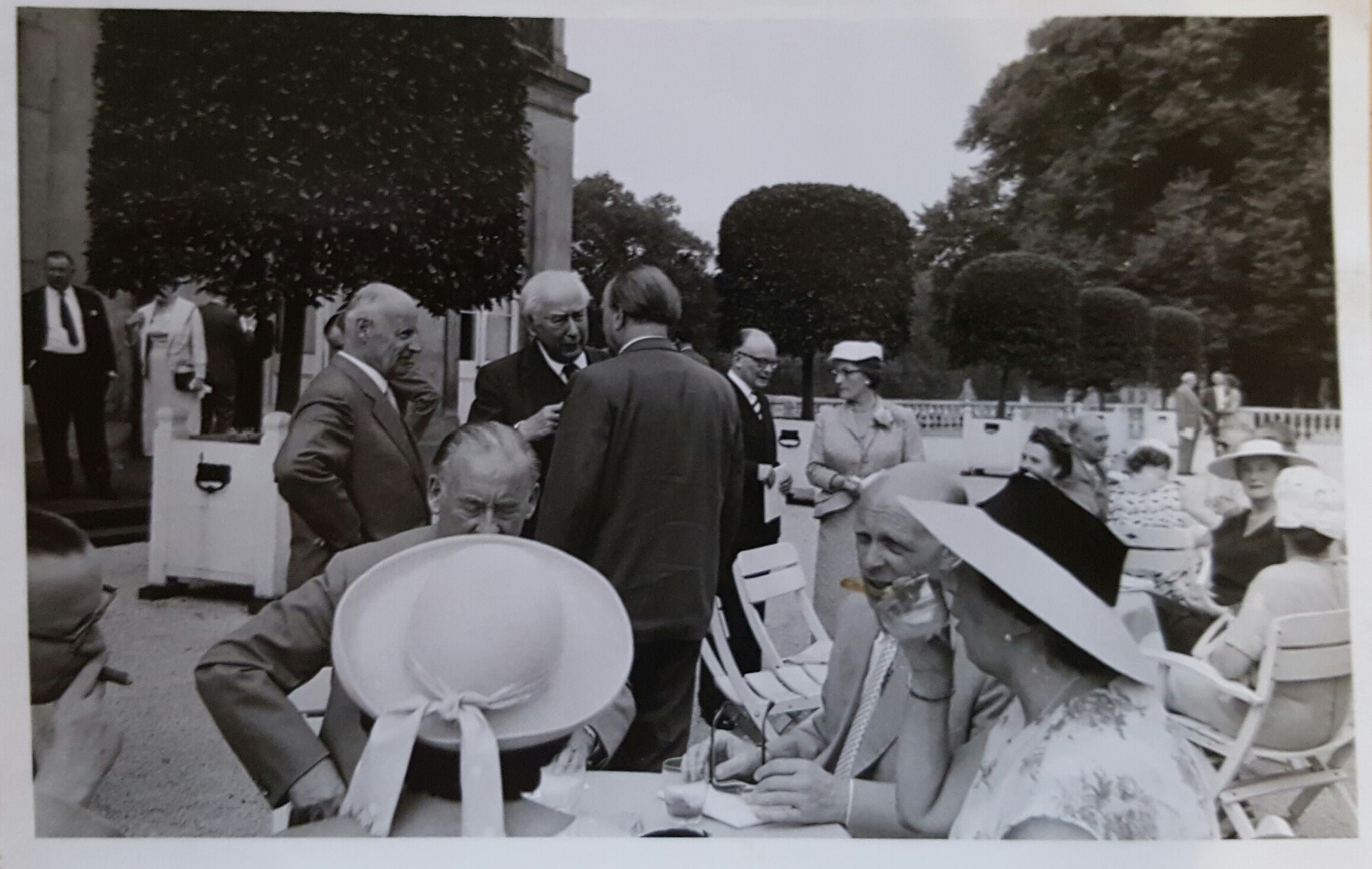 Paul Osthold (rechts) im Gespräch mit Theodor Heuss (Mitte)